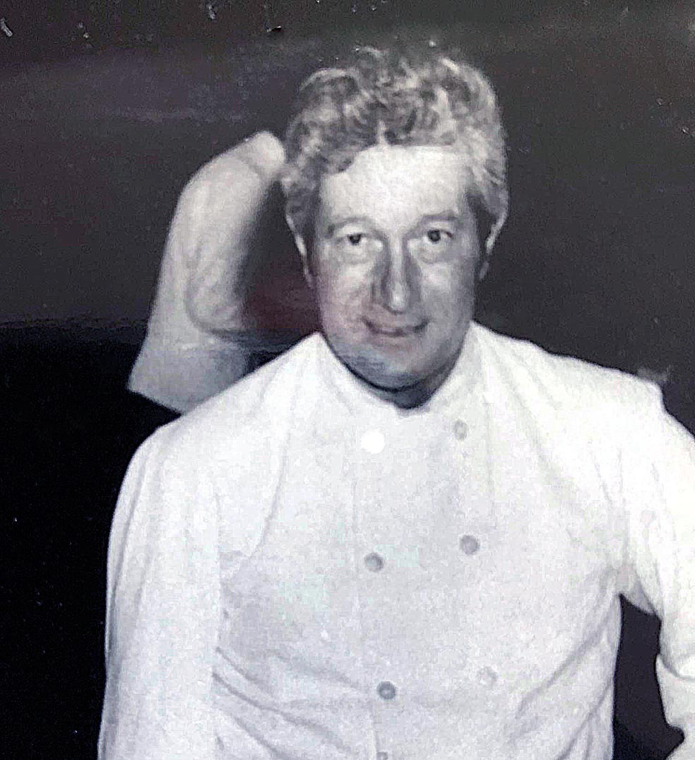 Jacques Manière du temps du 1er Pactole